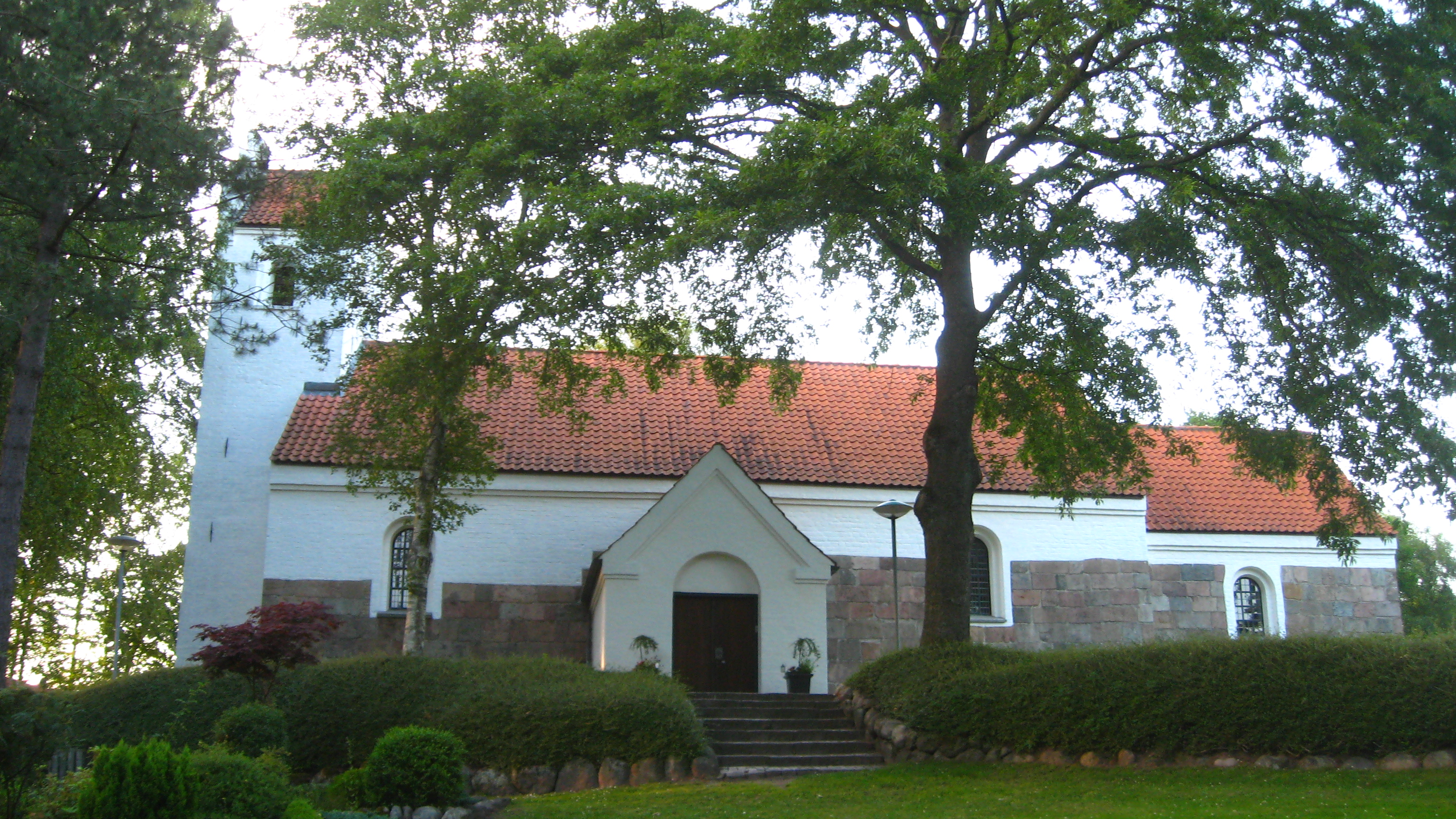 Hammer Kirke, Aalborg Kommune